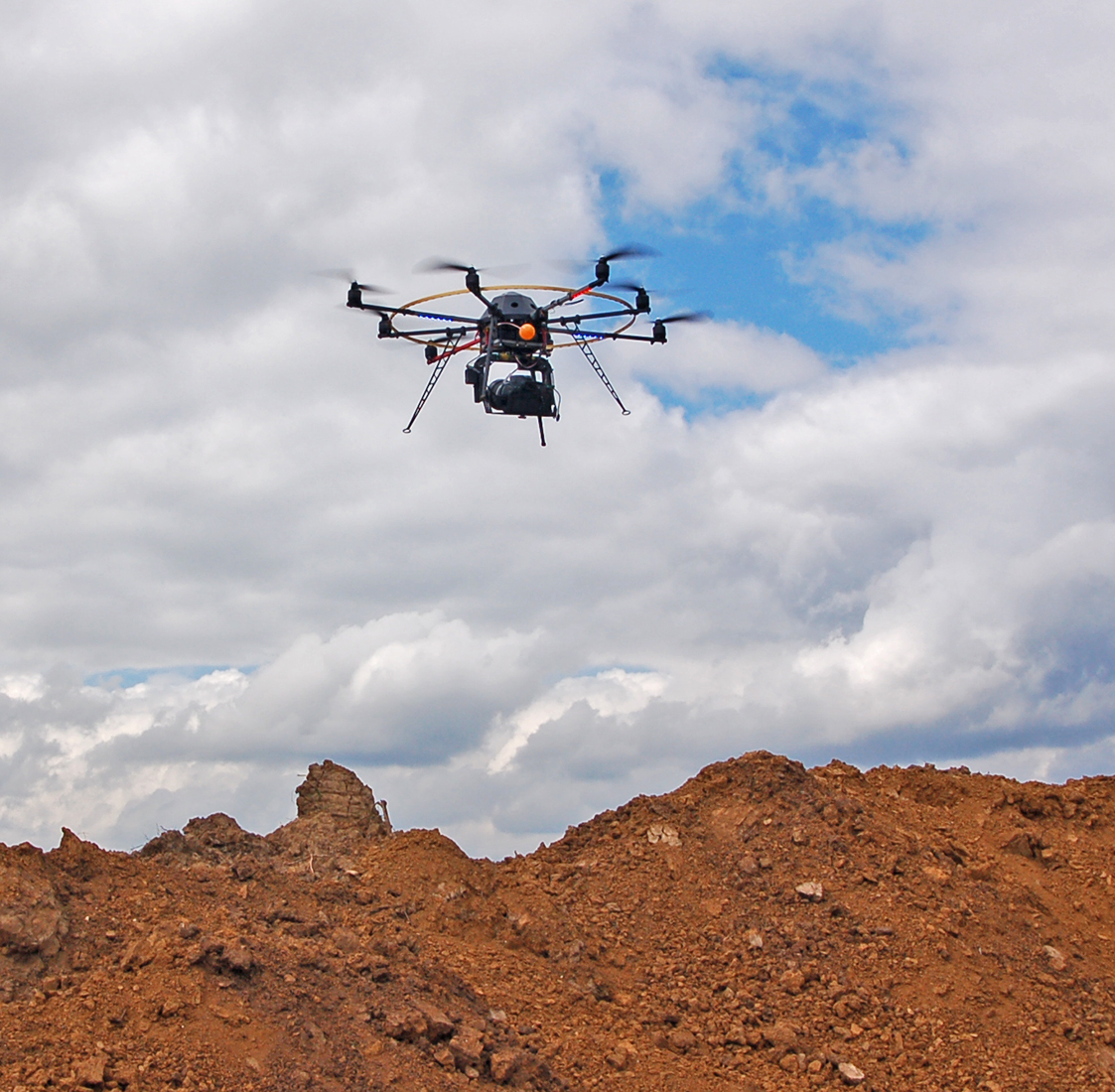 Mit Kamera bestückter Octocopter über dem Grabungsfeld des Landesdenkmalamts BW bei Kirchheim/Teck. Siedlungsrelikte der Bandkeramiker an der Nürtinger Straße